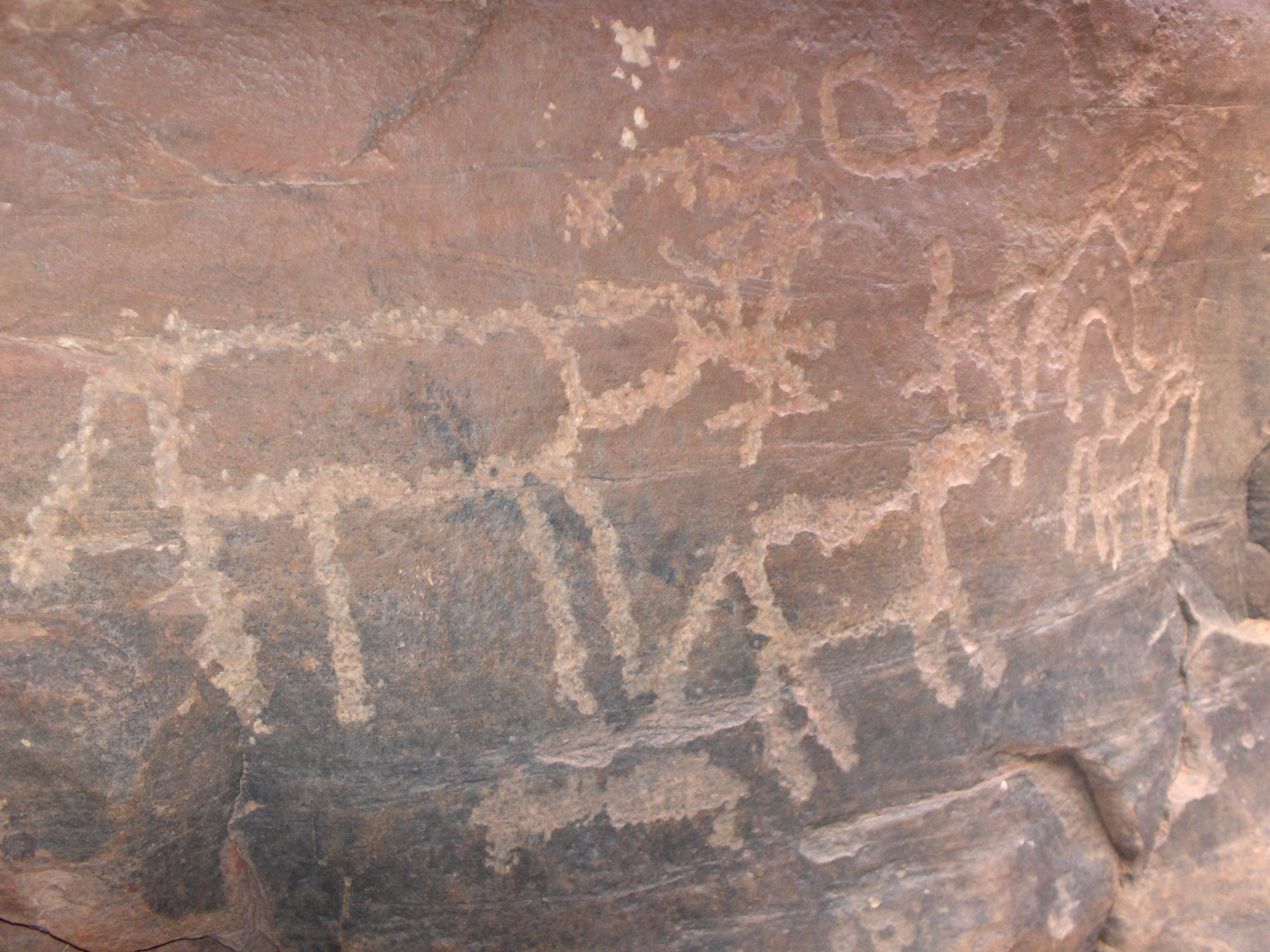 Incisioni rupestri nel Wadi Rum